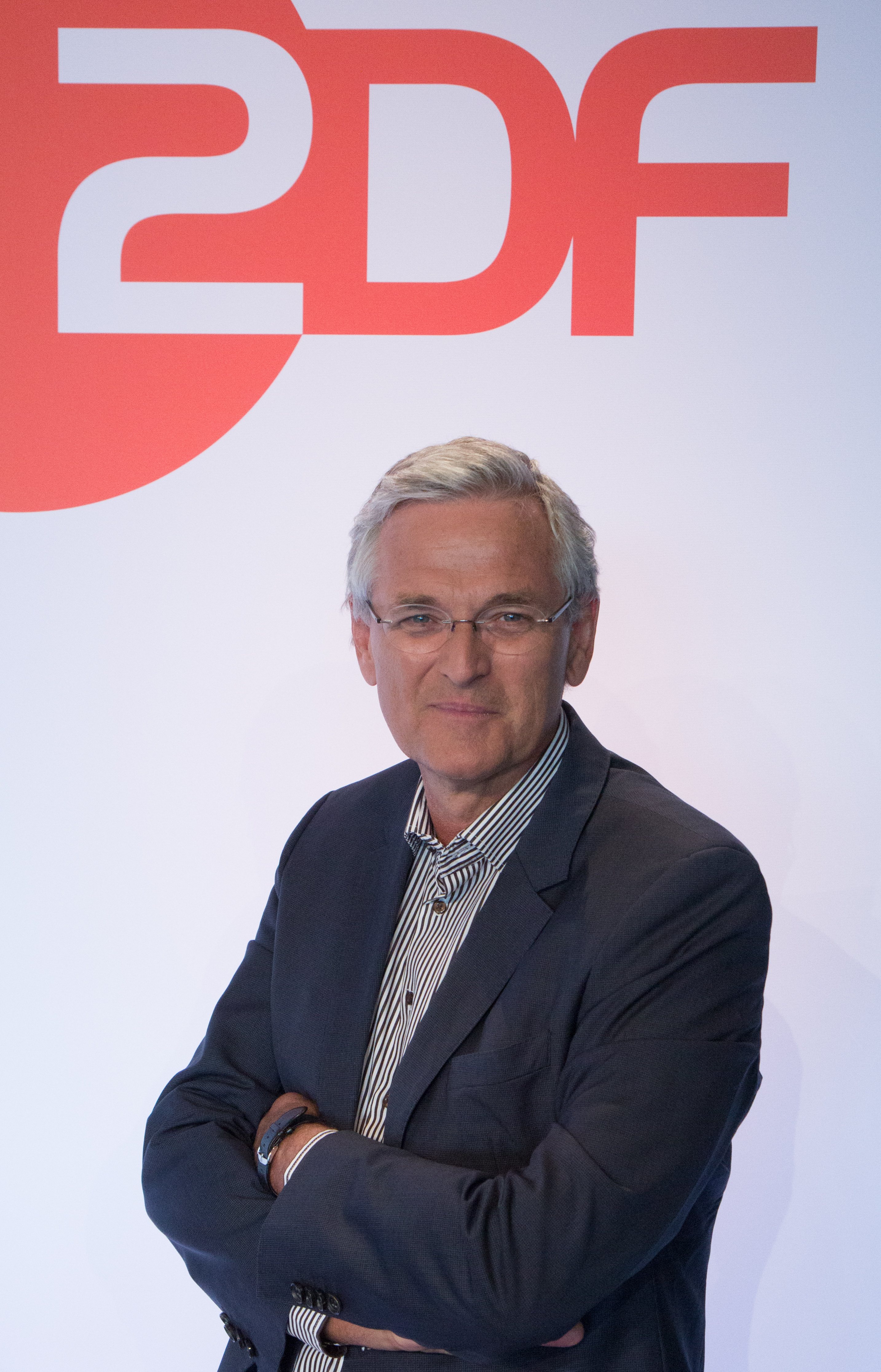 ZDF Chefredakteur Peter Frey